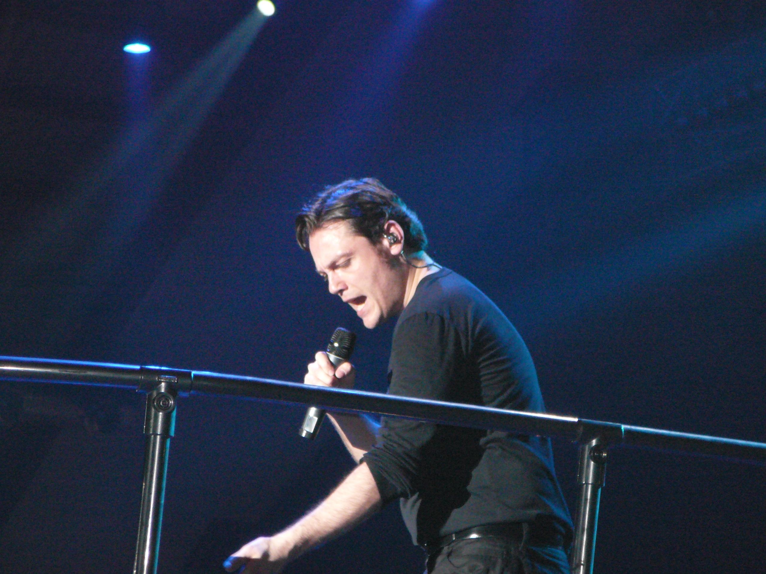 Alla mia età Tour 2009-2010 di Tiziano Ferro, 19-05-09, PalaEvangelisti, Perugia